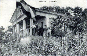 Das Kirchberghäuschen auf dem Bensheimer Kirchberg auf einer Postkarte aus dem Jahr 1906